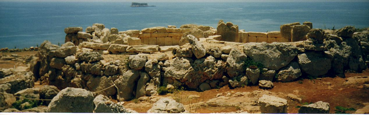 Tempelanlage im Süden von Malta)